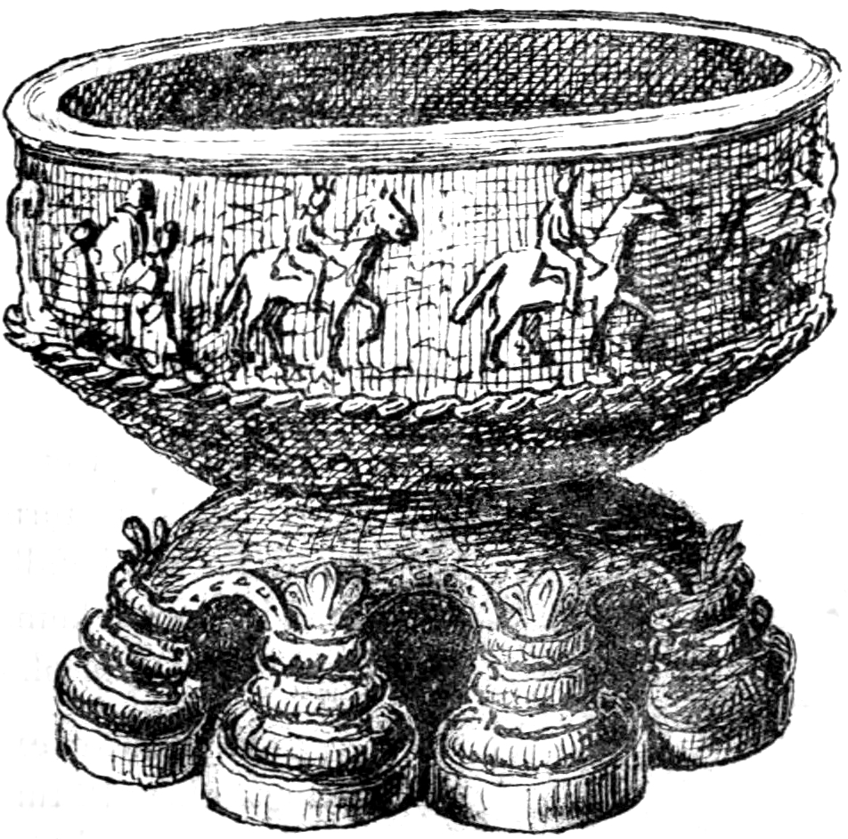 Dopfunt i Gista (Gistads) kyrka. Teckning i "Utdrag af Antiqvitets-Intendenten P. A. Säves afgifna berättelse för år 1861", publicerad i Antiqvarisk tidskrift för Sverige band 1, 1864.